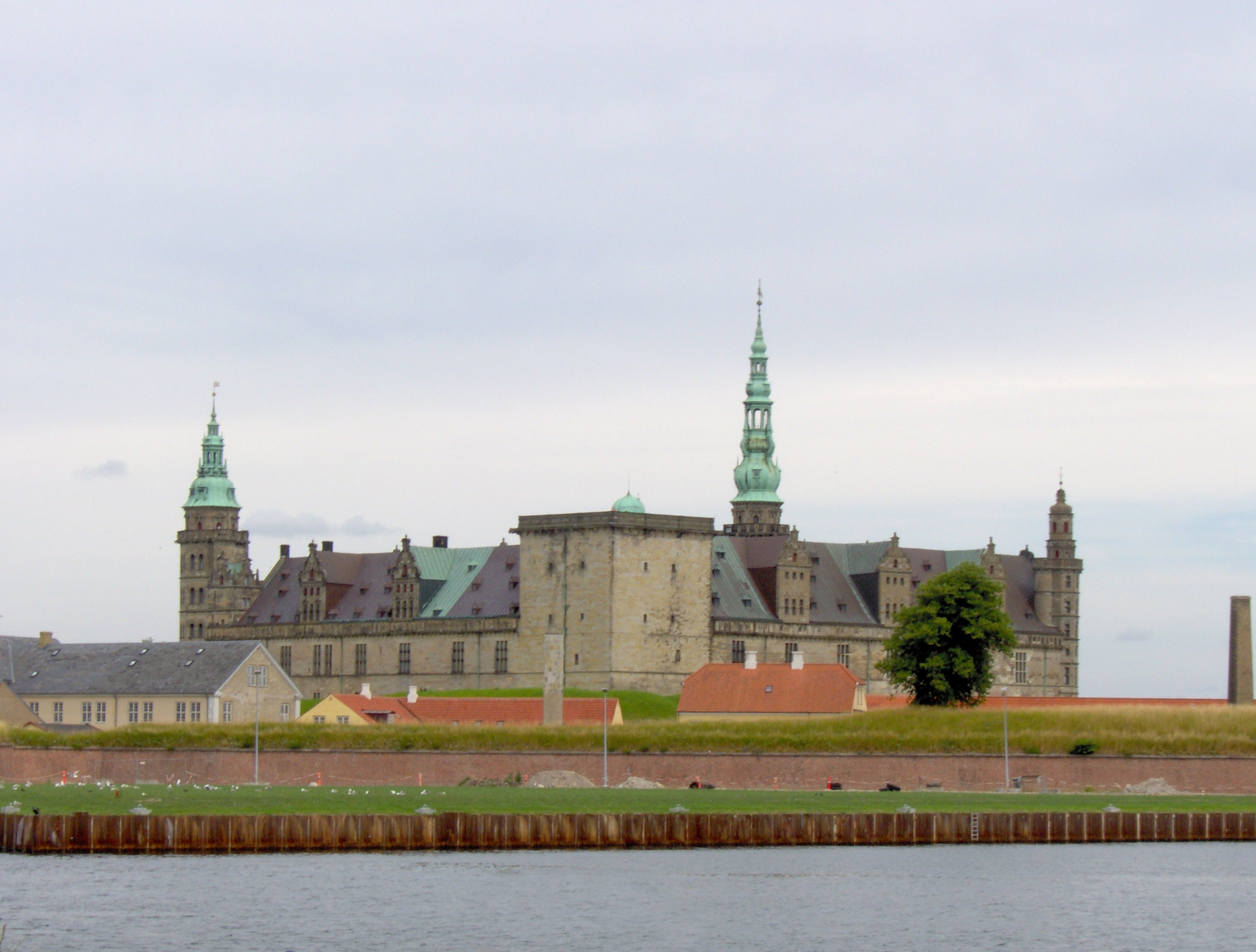 Kronborg set fra Helsingør